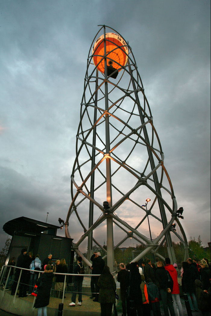 Aérophare, Évry 2, France